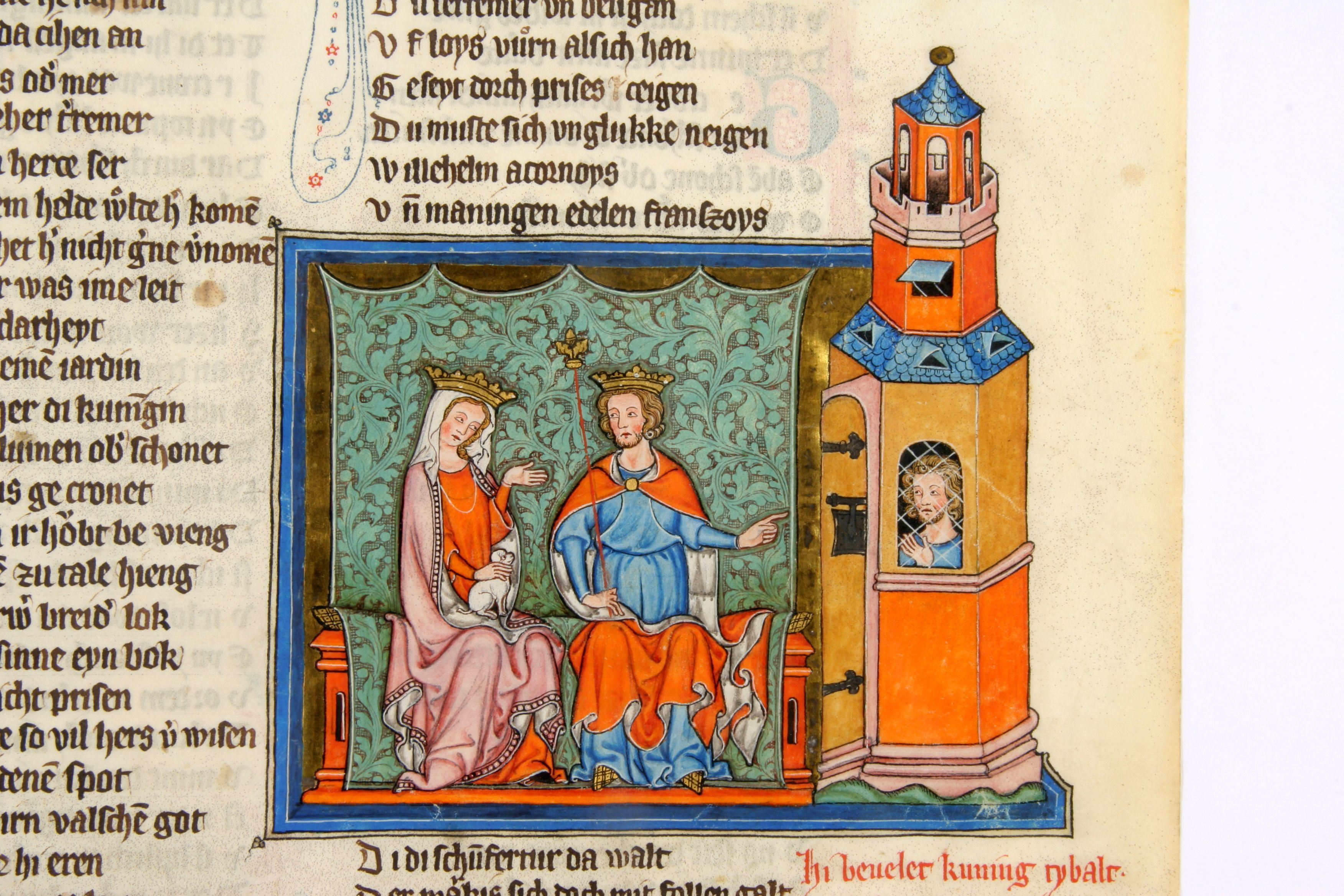 MIniatur